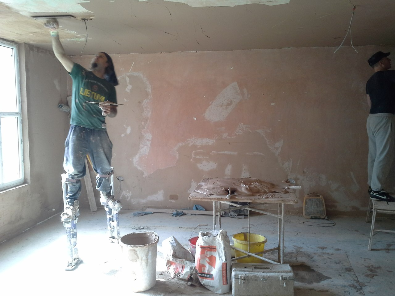 Штукатур на робочих ходулях в Лондоні. 2014р.